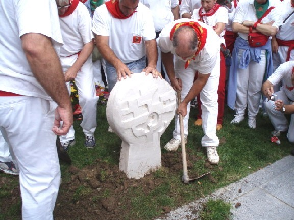 German Rodriguezen omenezko oroitarria, 2007